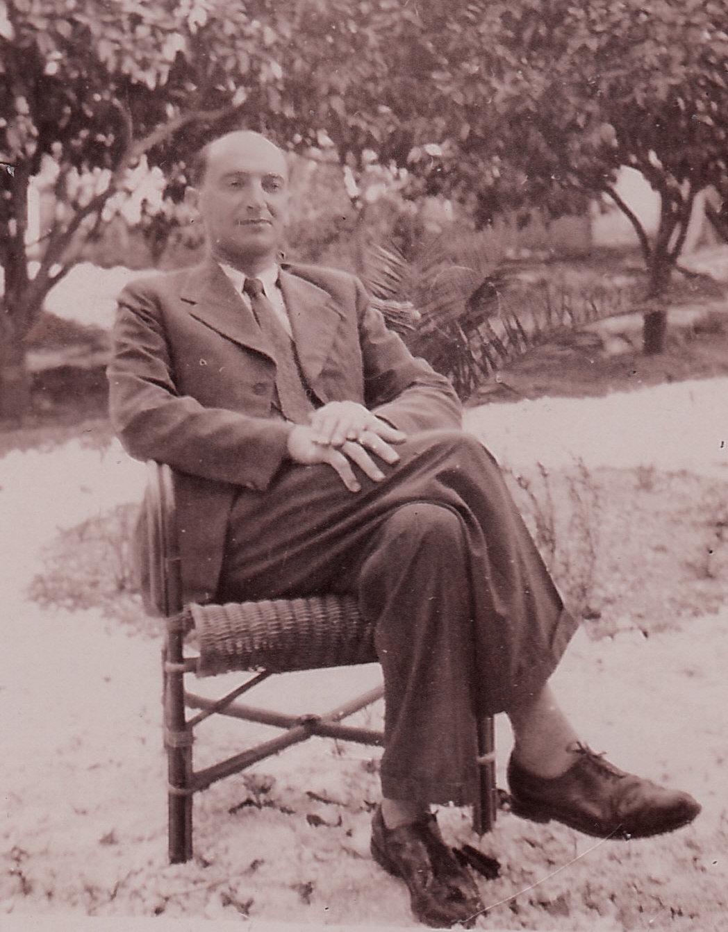 קורט קירשמן